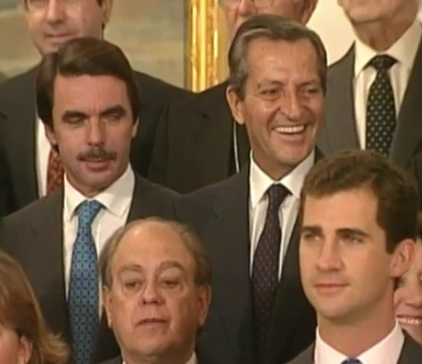 José María Aznar, Adolfo Suárez, Jordi Pujol y Felipe de Borbón (22 de noviembre de 1995).